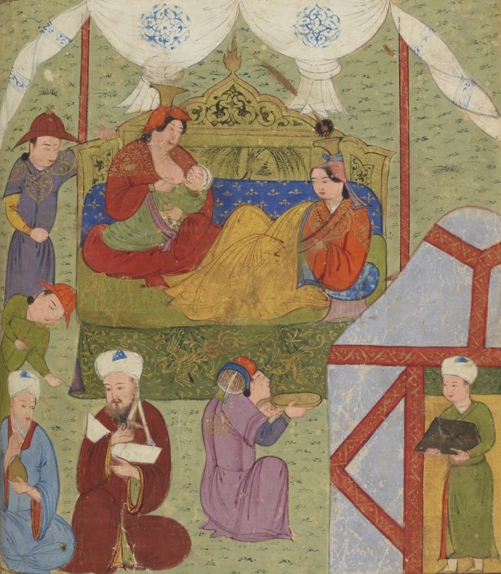 Ghazan Being Breastfed